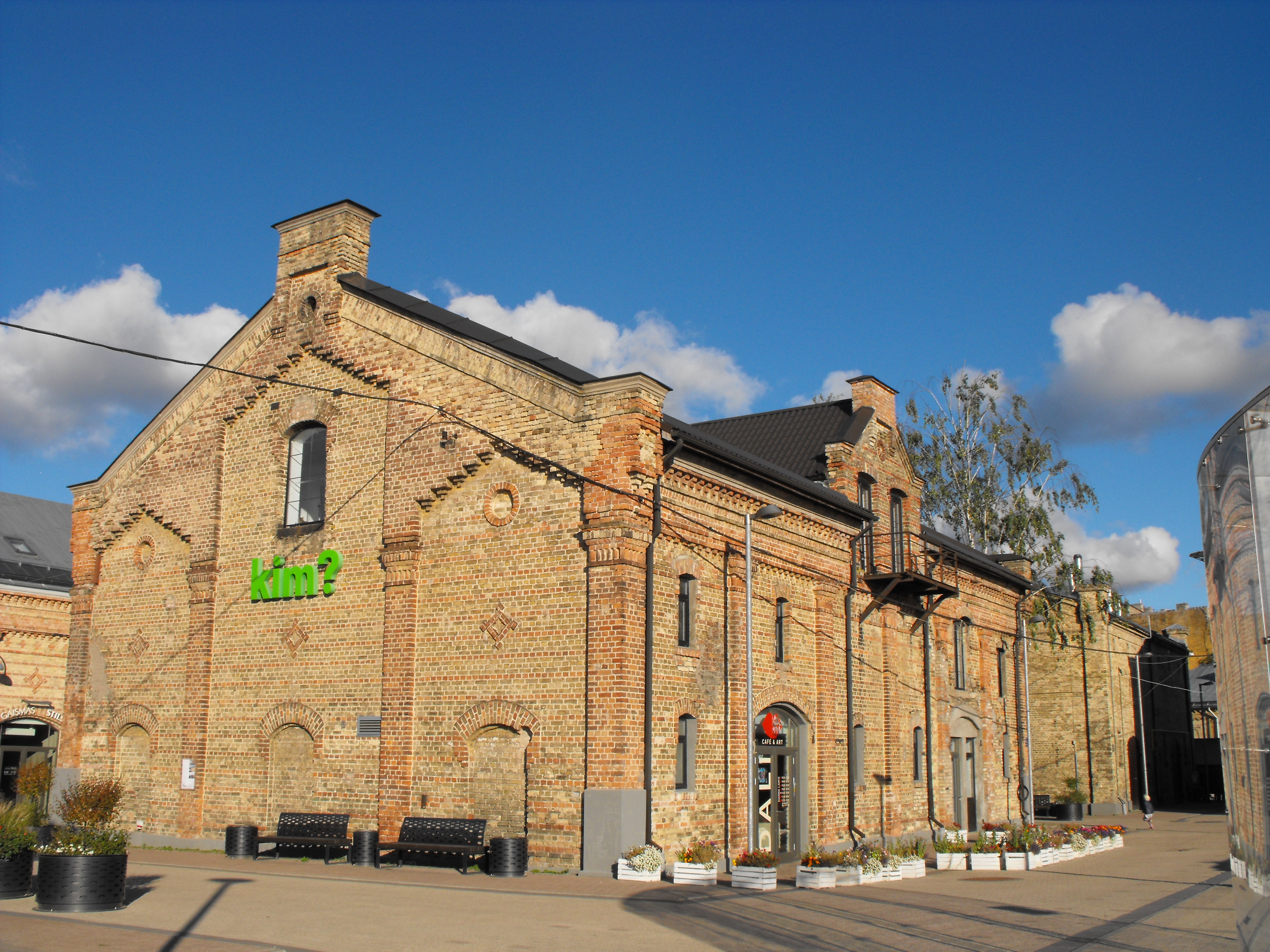 Spīķeru apbūves ansamblis, Rīga, Maskavas iela 12, k-1